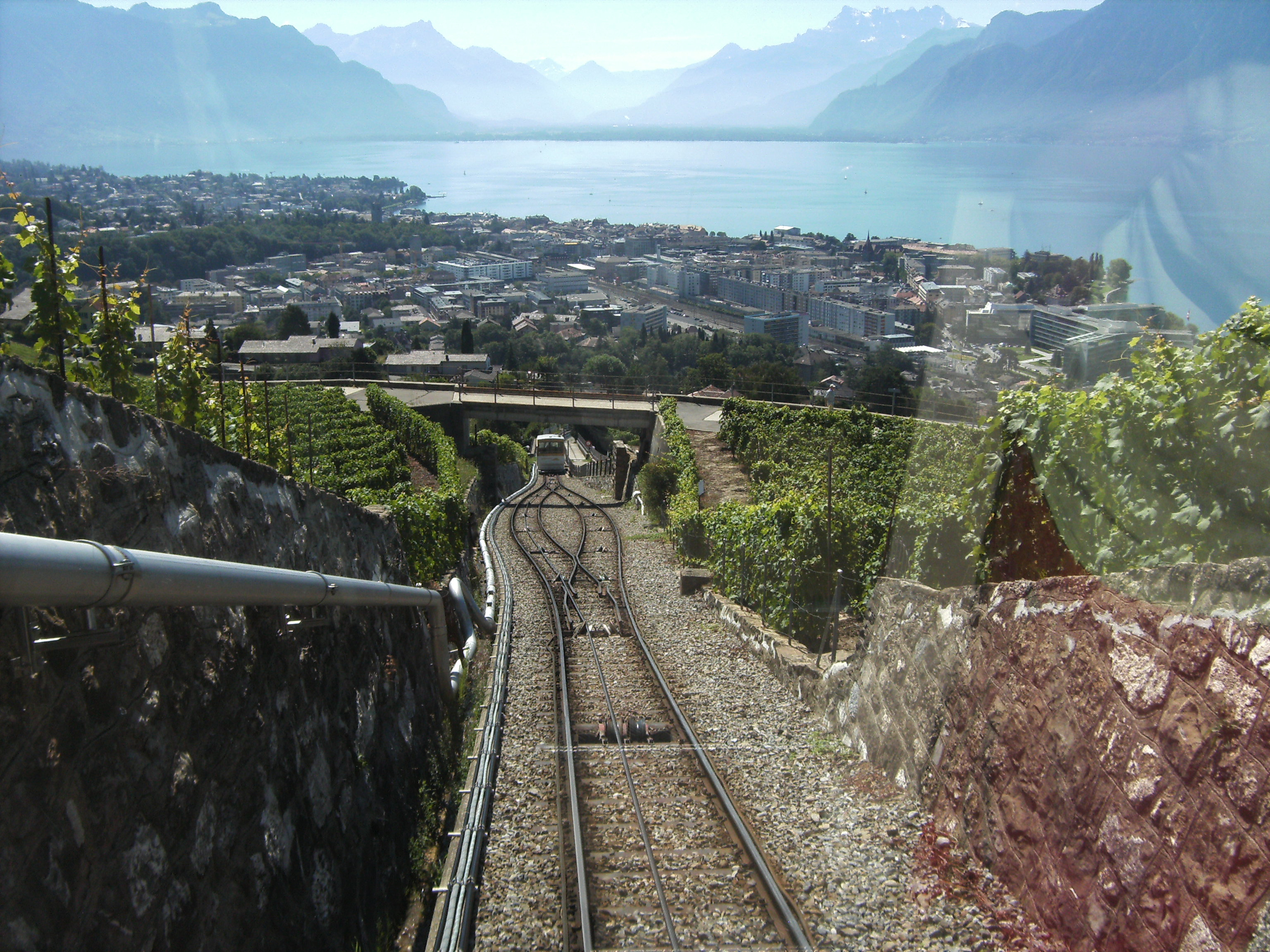 Funiculaire Vevey–Chardonne–Mont Pèlerin